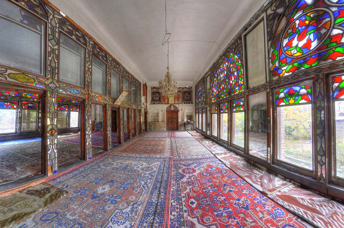 حسینیه مجتهد دلجو/ مرحوم